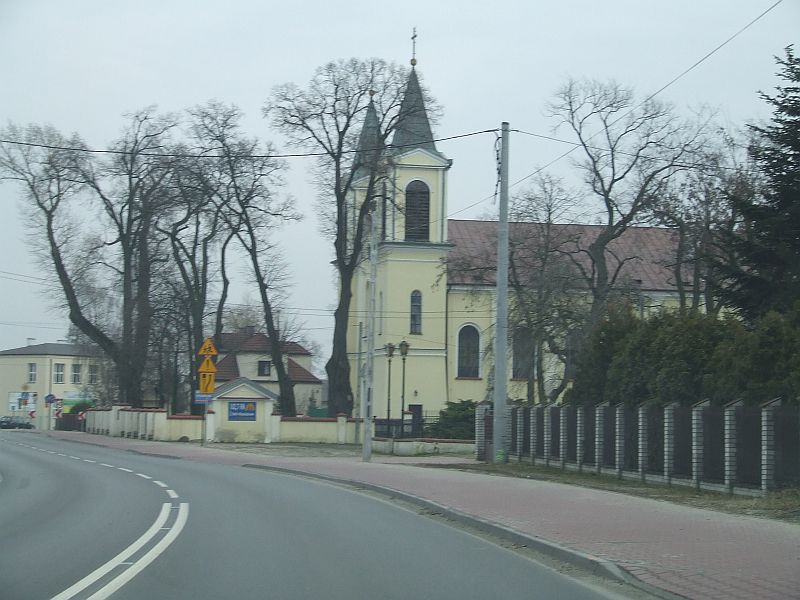 Borzęcin Duży, church 19th c., Poland